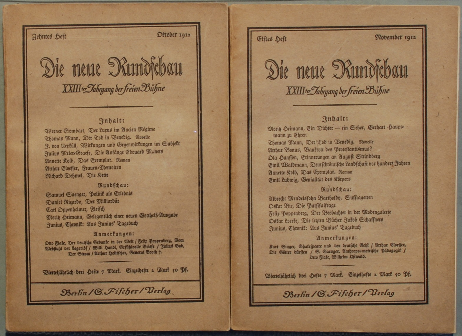 Thomas Mann: Der Tod in Venedig. Novelle. In: Die neue Rundschau 1912, Heft 10 + 11, S. Fischer Verlag Berlin. Potempa E26.2 [1] 2. Druck nach der Erstveröffentlichung als Hundertdruck im Hyperionverlag Hans von Weber.